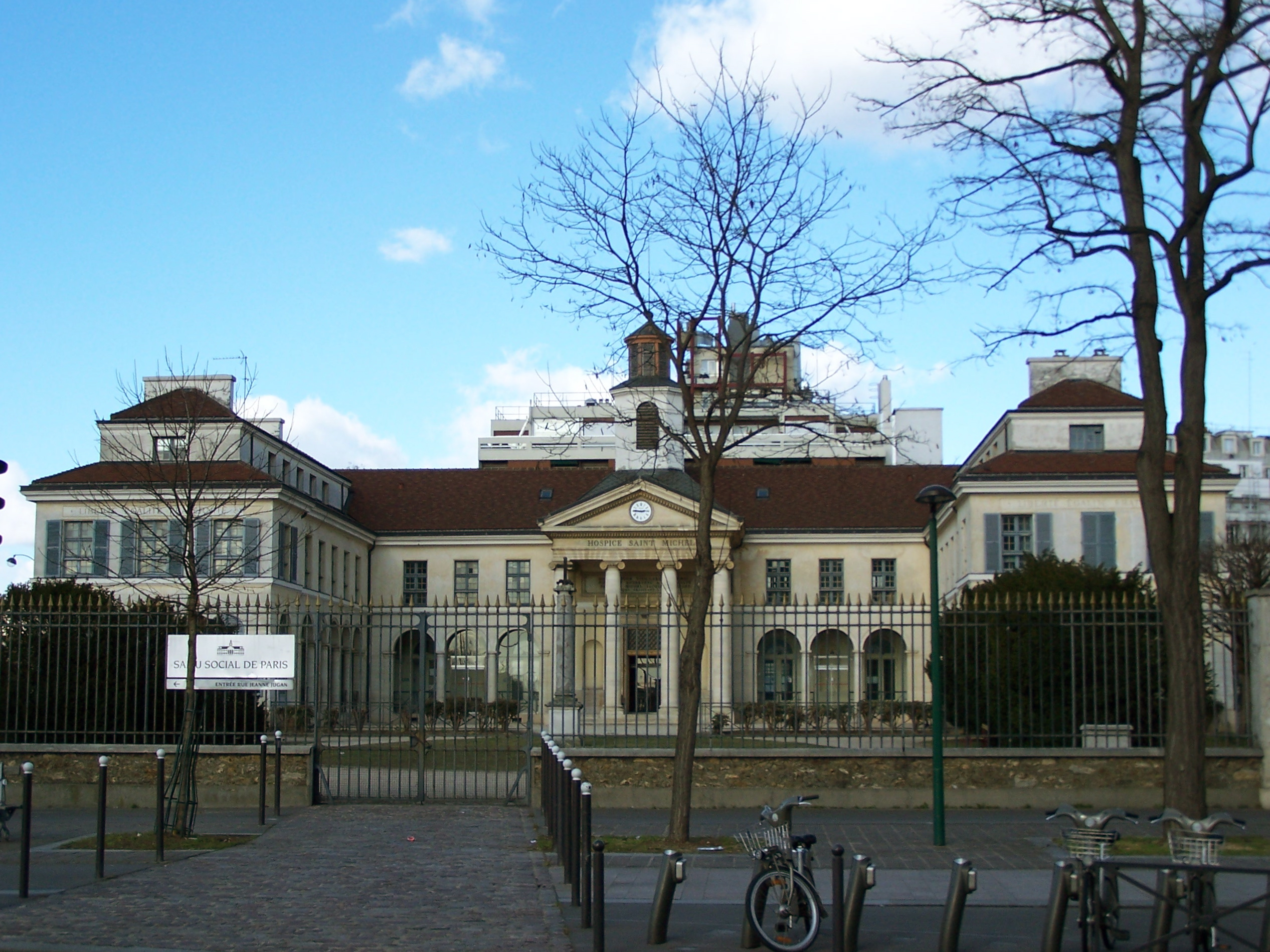 L'ancien hospice Saint-Michel de Saint-Mandé, actuel site du SAMU social de Paris, avenue Courteline